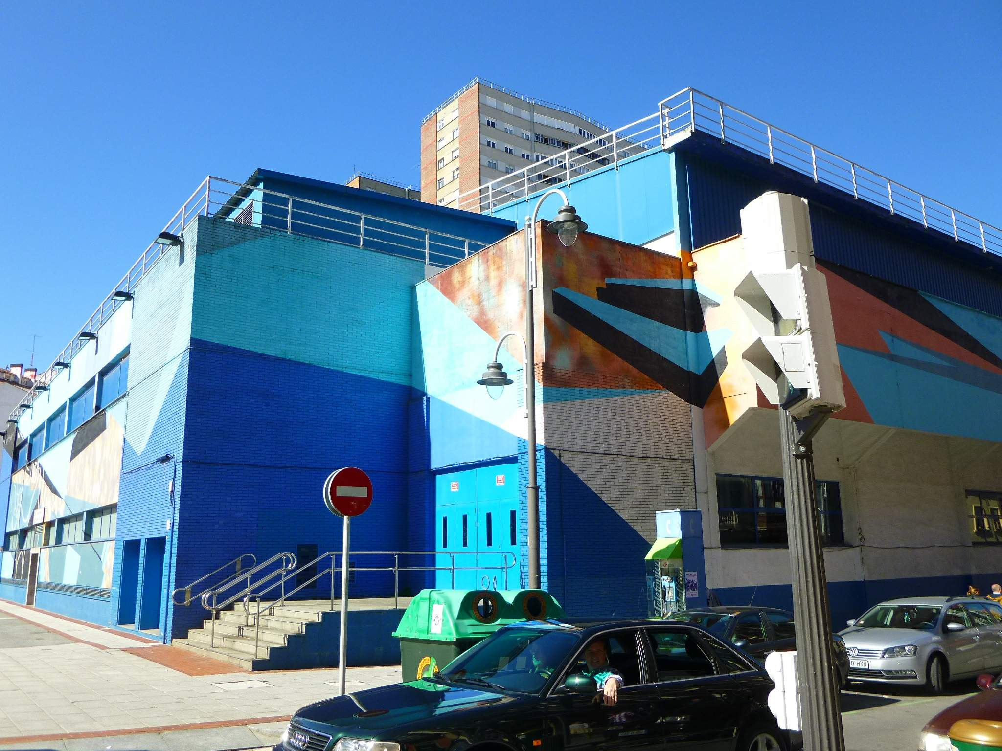 Pabellón de deportes La Casilla (Bilbao)